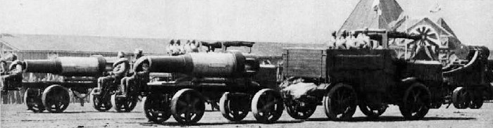 Vojna parada kraljeve jugoslovanske vojske v Beogradu - topništvo